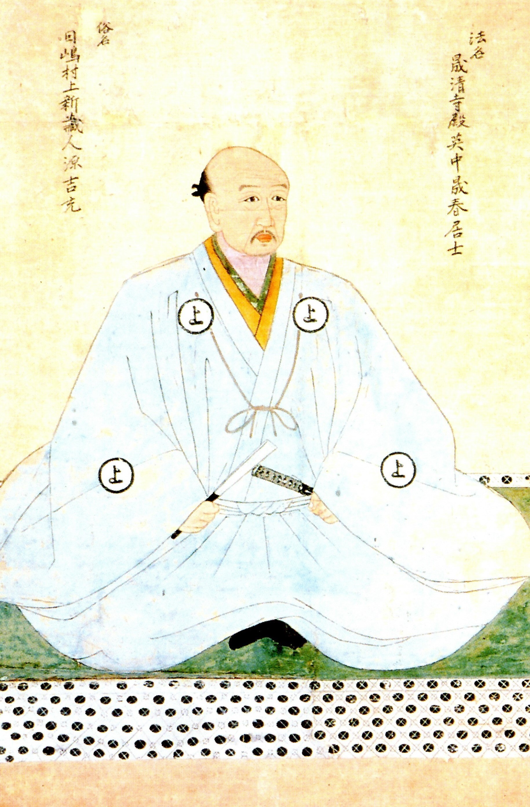 村上吉充(第6代)の肖像。